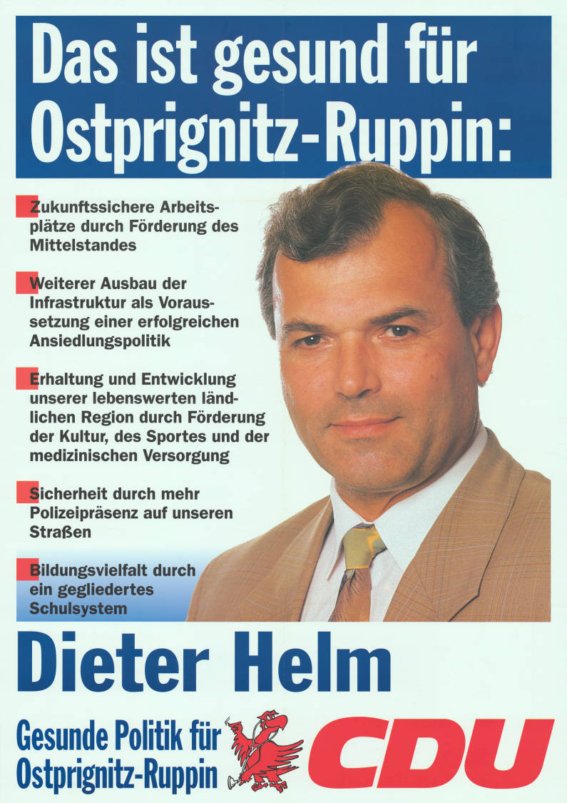 Das ist gesund für Ostprignitz-Ruppin: . Zukunftssichere Arbeitsplätze durch Förderung des Mittelstandes . Weiterer Ausbau der Infrastruktur ... . Erhaltung und Entwicklung unserer lebenswerten ländlichen Region durch Förderung der Kultur, des Sports und der medizinischen Versorgung . Sicherheit durch mehr Polizeipräsenz ... . Bildungsvielfalt durch ein gegliedertes Schulsystem Dieter Helm Gesunde Politik für Ostprignitz-Ruppin CDU Abbildung: Porträtfoto Plakatart: Kandidaten-/Personenplakat mit Porträt Objekt-Signatur: 10-033 : 204 Bestand: Landtagswahlplakate Brandenburg (10-033) GliederungBestand10-18: Landtagswahlplakate Brandenburg (10-033) » CDU Lizenz: KAS/ACDP 10-033 : 204 CC-BY-SA 3.0 DE